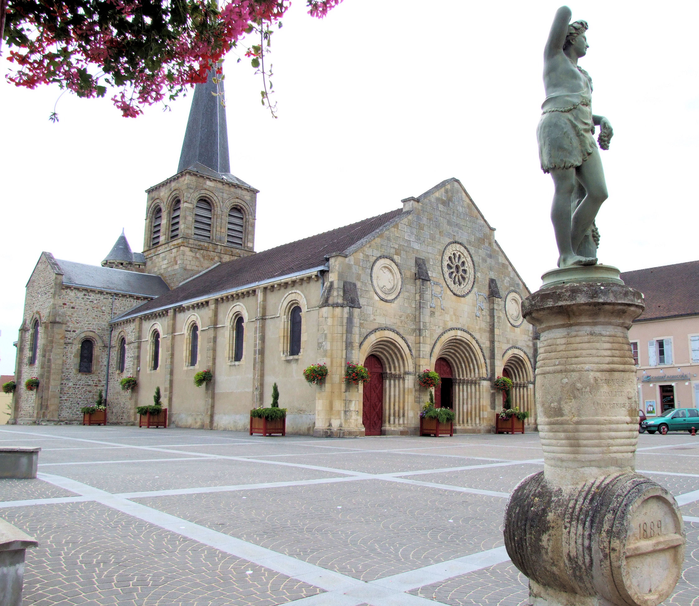 Domérat - Eglise Notre-Dame - Ensemble